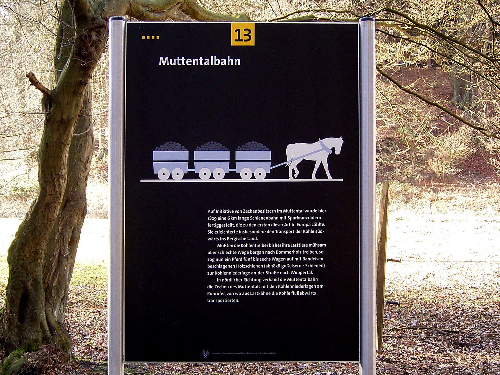 Bergbauwanderweg Muttental in Witten